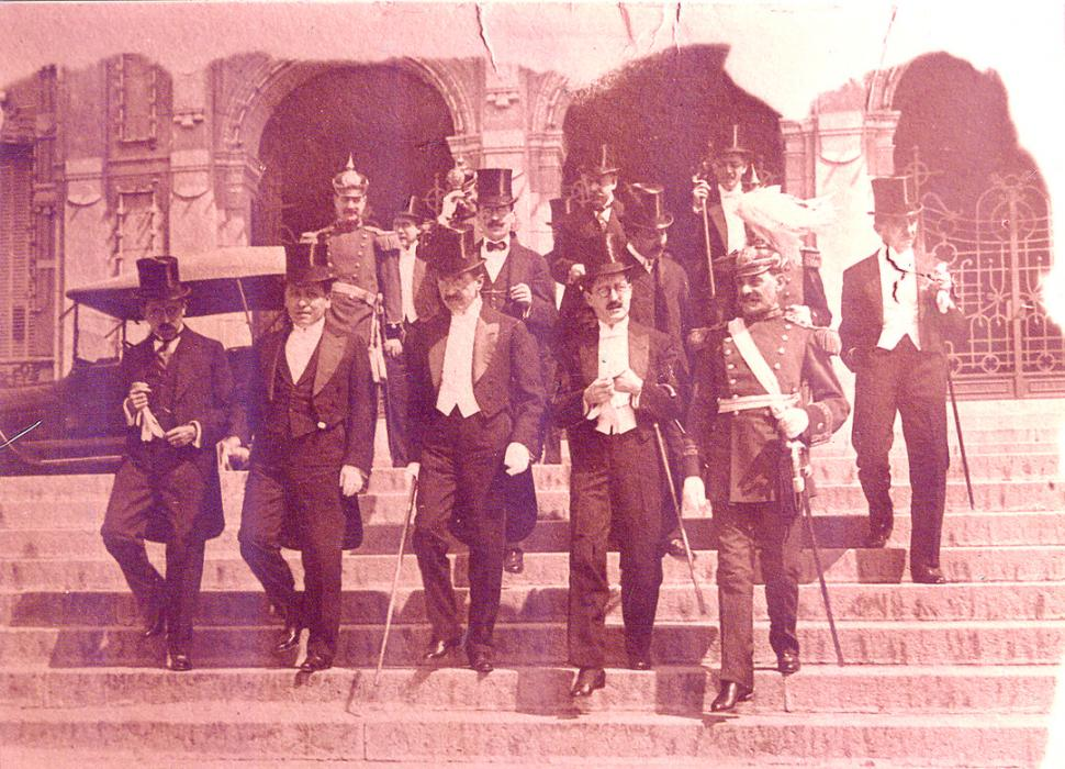 Fotografía del gobernador de Tucumán, Juan Baustista Bascary en una ceremonia oficial acompañado por sus ministros Ignacio Toledo y Napoleón de la Rosa, junto al presidente de la Corte Suprema de Justicia, Miguel Campero, y el comandante de la Delegación Militar Tucumán.